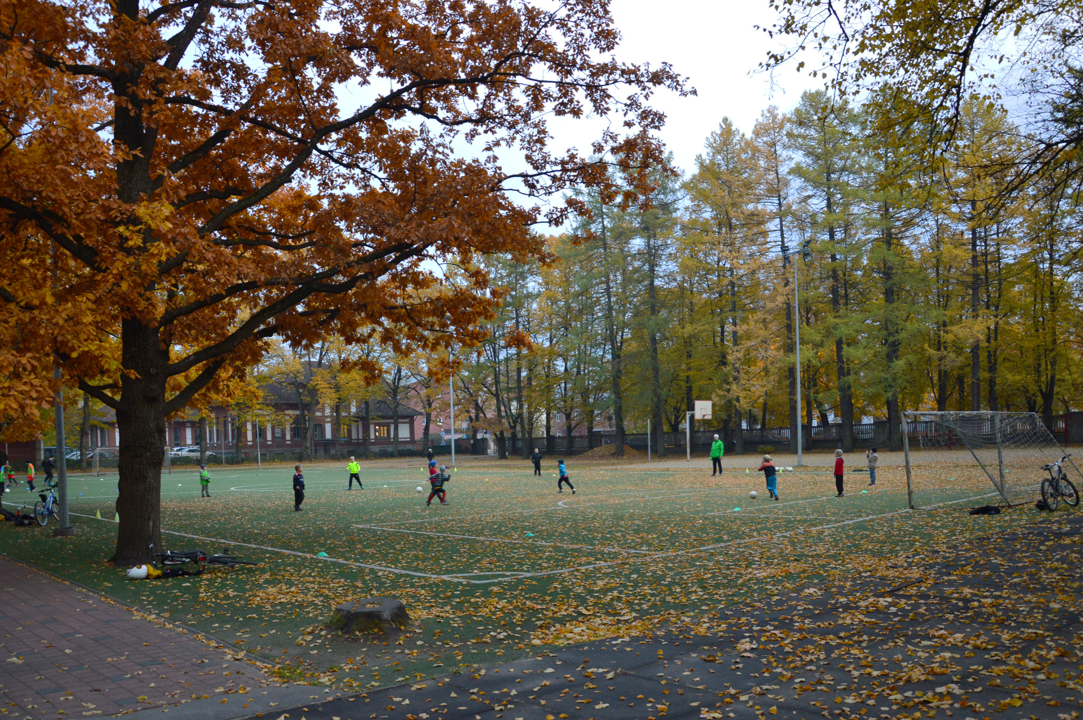 Miina Härma gümnaasiumi spordiväljak